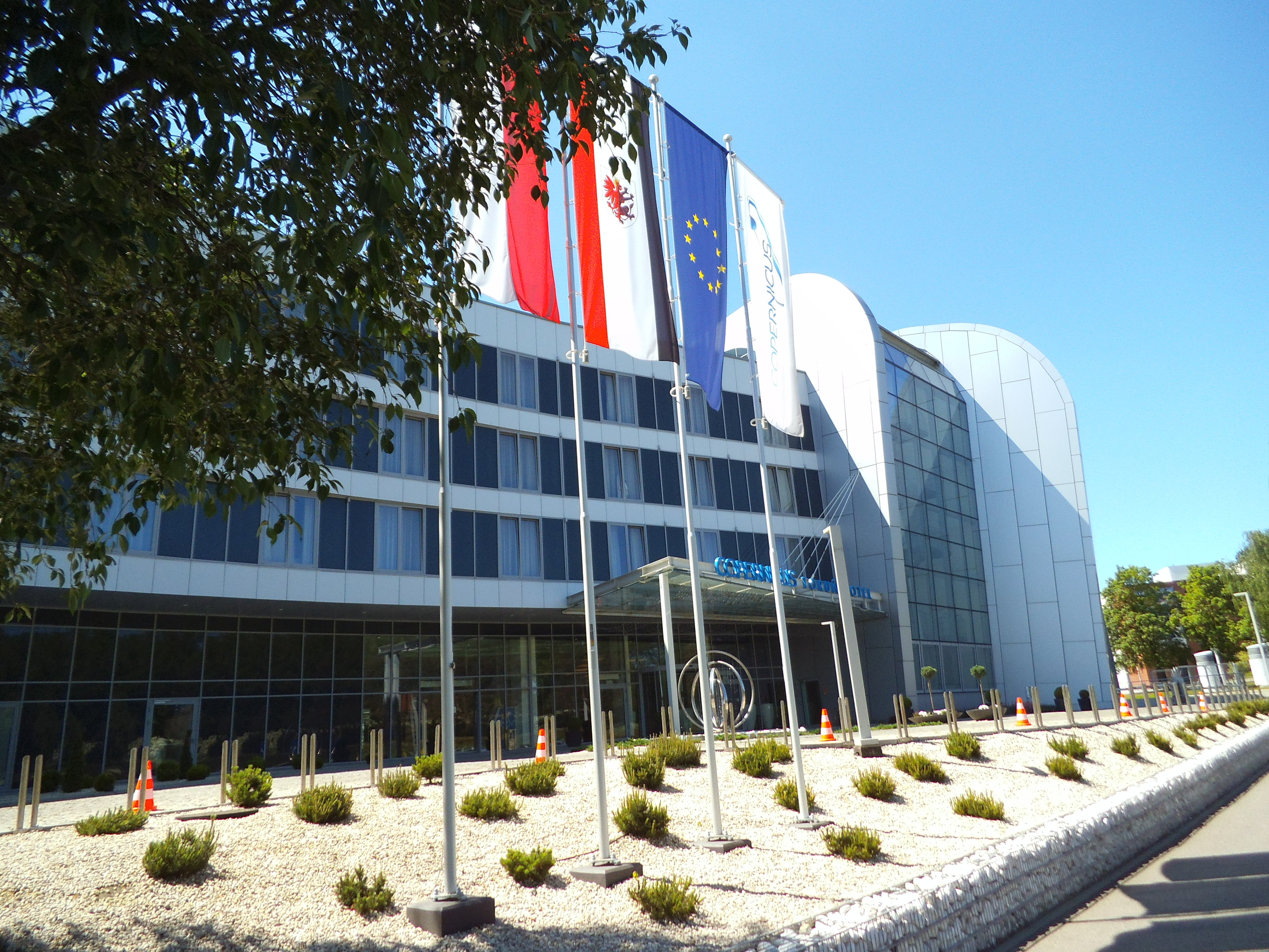 Copernicus Toruń Hotel